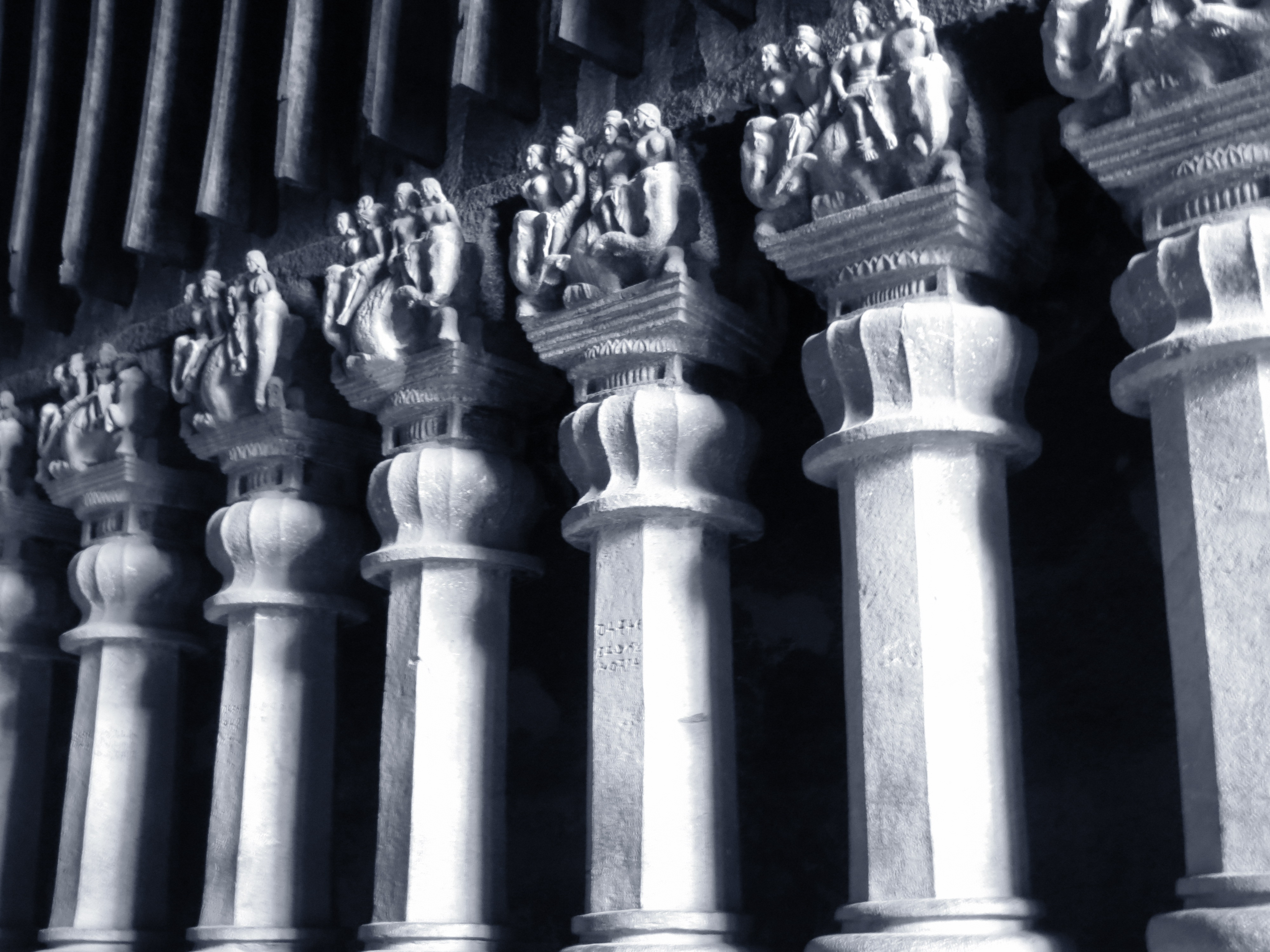 Detail aus der Haupthalle der Buddhistischen Höhlenstupa